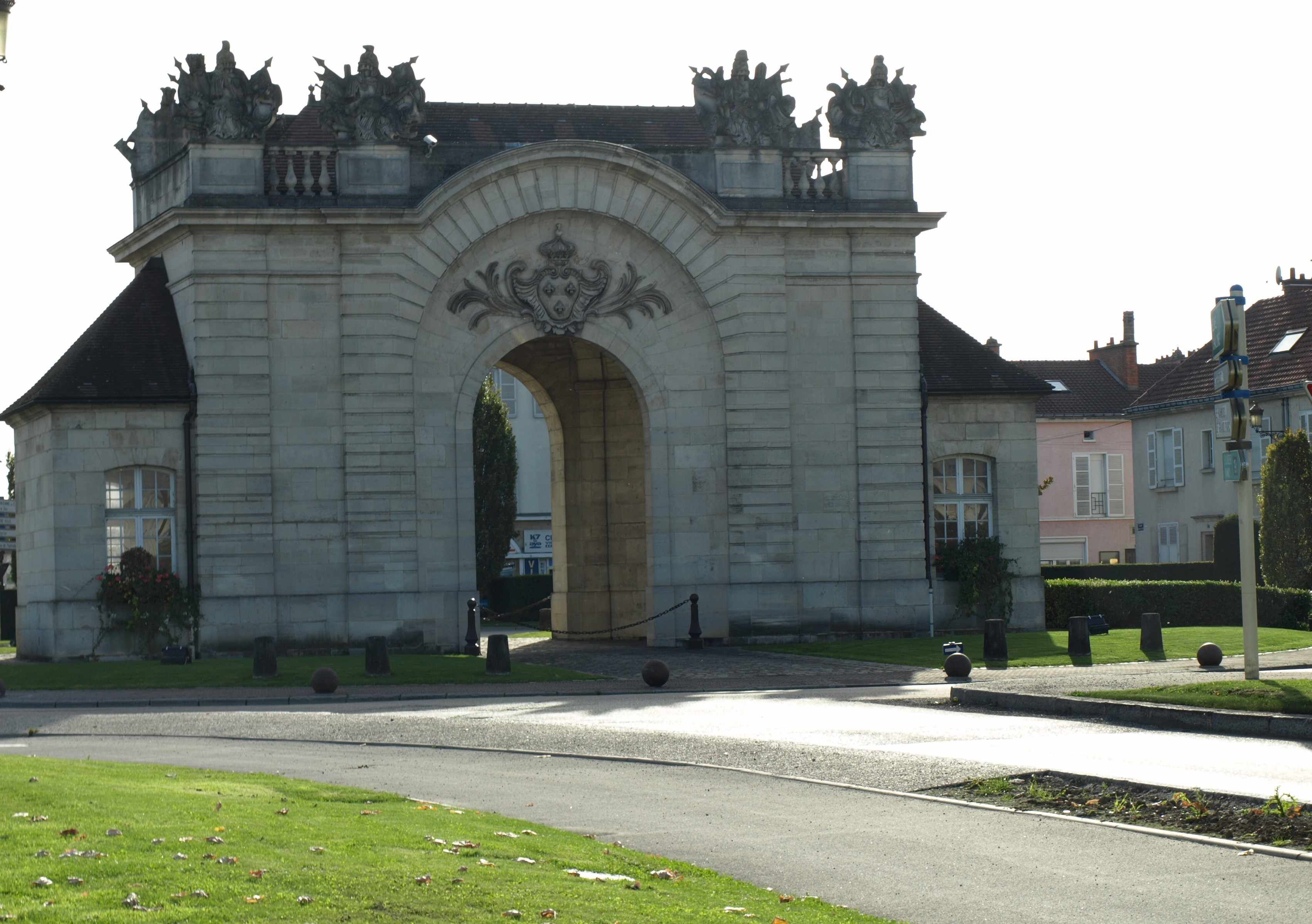 Vitry-le-François (51300 - FRANCE) : photographies Porte du pont (détail).